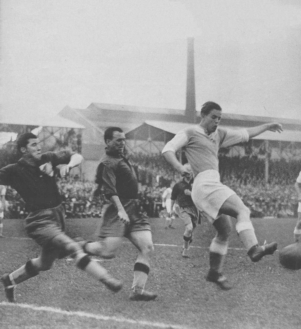 Association Football, France 1934/35: FC Sochaux - RC Strasbourg 2-3 Albert Gougain (FC Sochaux) - Conrado Ross (1908-70 / FC Sochaux) Oskar Rohr (1912-88 / RC Strasbourg) Cover page of "Le Mirroir des Sports" - 30 October 1934 - No. 796 A SOCHAUX, OSKAR ROHR, L'AVANT CENTRE DE STRASBOURG, passe la balle à son ailier gauche, au cours du match passionné dont Strasbourg sortit victorieux pa 3 buts à 2. Derrière l'attaquant au maillot clair, deux défenseurs de Sochaux, au maillot foncé, ont surgi pour tenter d'ecarter le danger. Ce sont, de gauche à droite, les demis Albert Gougain et Conrad Ross.